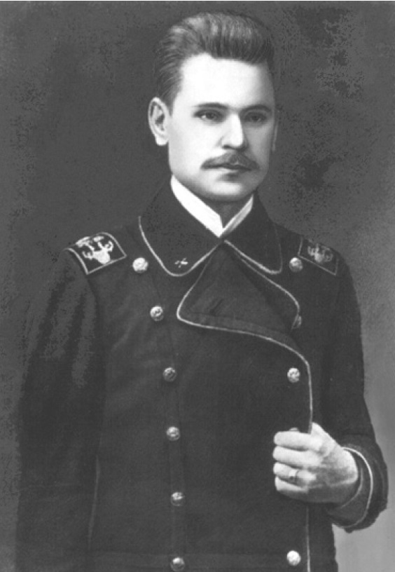 Беларуская (тарашкевіца): Антон Сокал-Кутылоўскі ў часе навучаньня ў Пецярбурскім унівэрсытэце 1910-я гг.